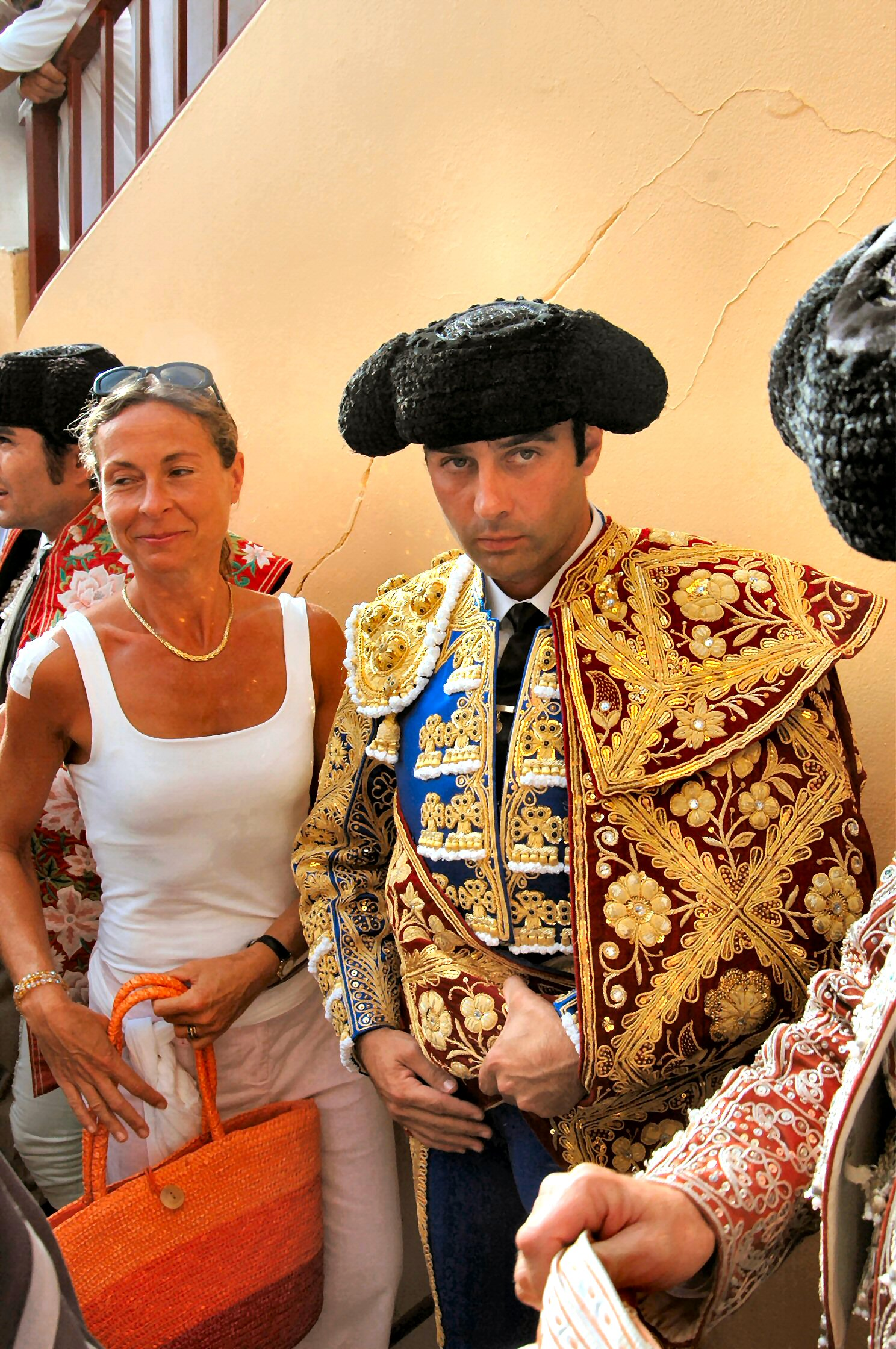 Enrique Ponce, dernier instant de concentration, Bayonne Septembre 2004 ola alex como te llamas